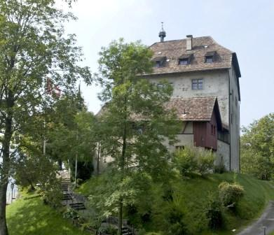 Schloss Oberberg